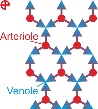 Die Verteilung des Blutstroms der Endäste der Choriocapillaris ist als Verteilungsstrom dargestellt. Die Zu- und Abflüsse erfolgen in/aus einer anderen Ebene.